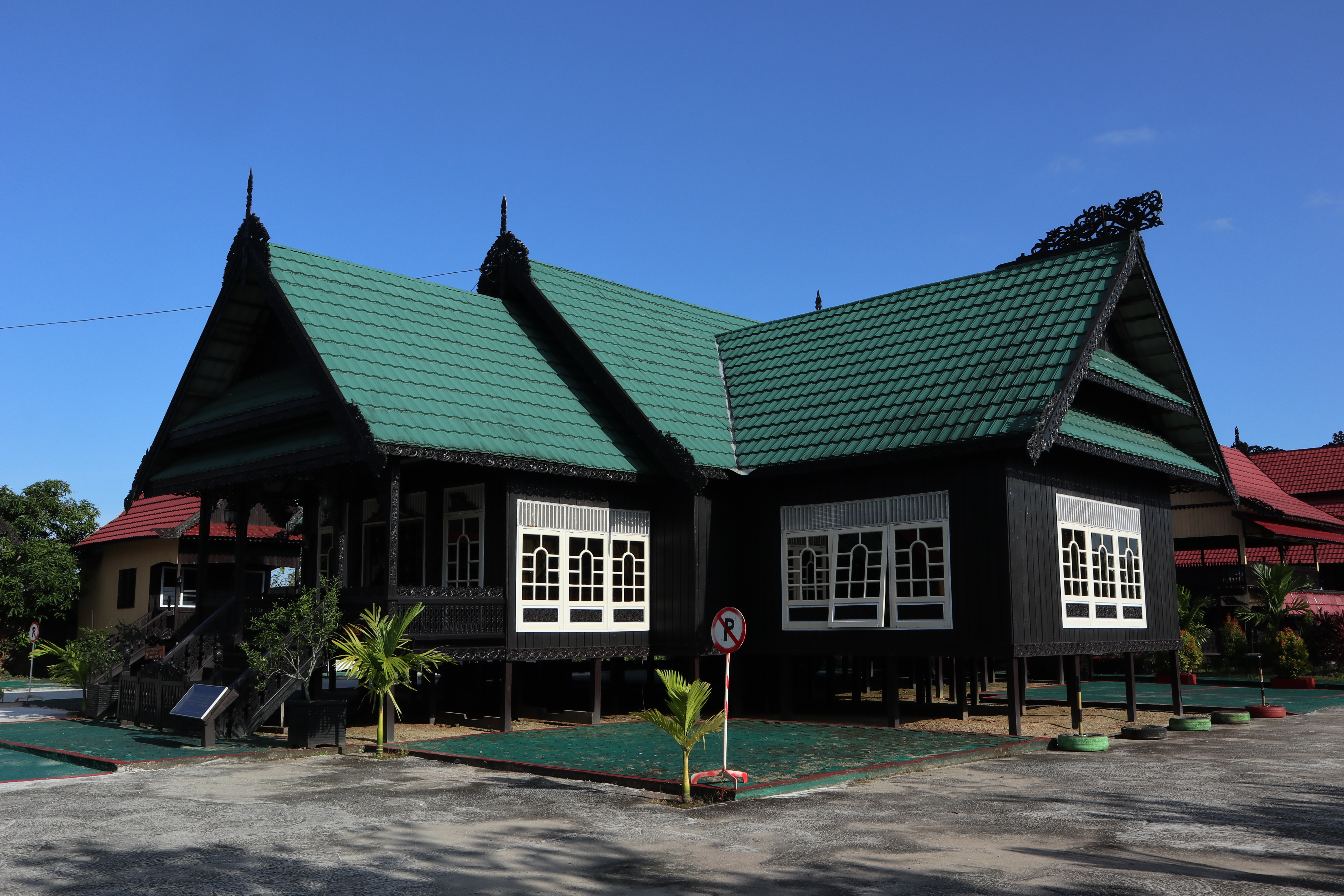 Salah satu baloy yang berada di kompleks Baloy Mayo Adat Tidung Kota Tarakan, Kalimantan Utara.